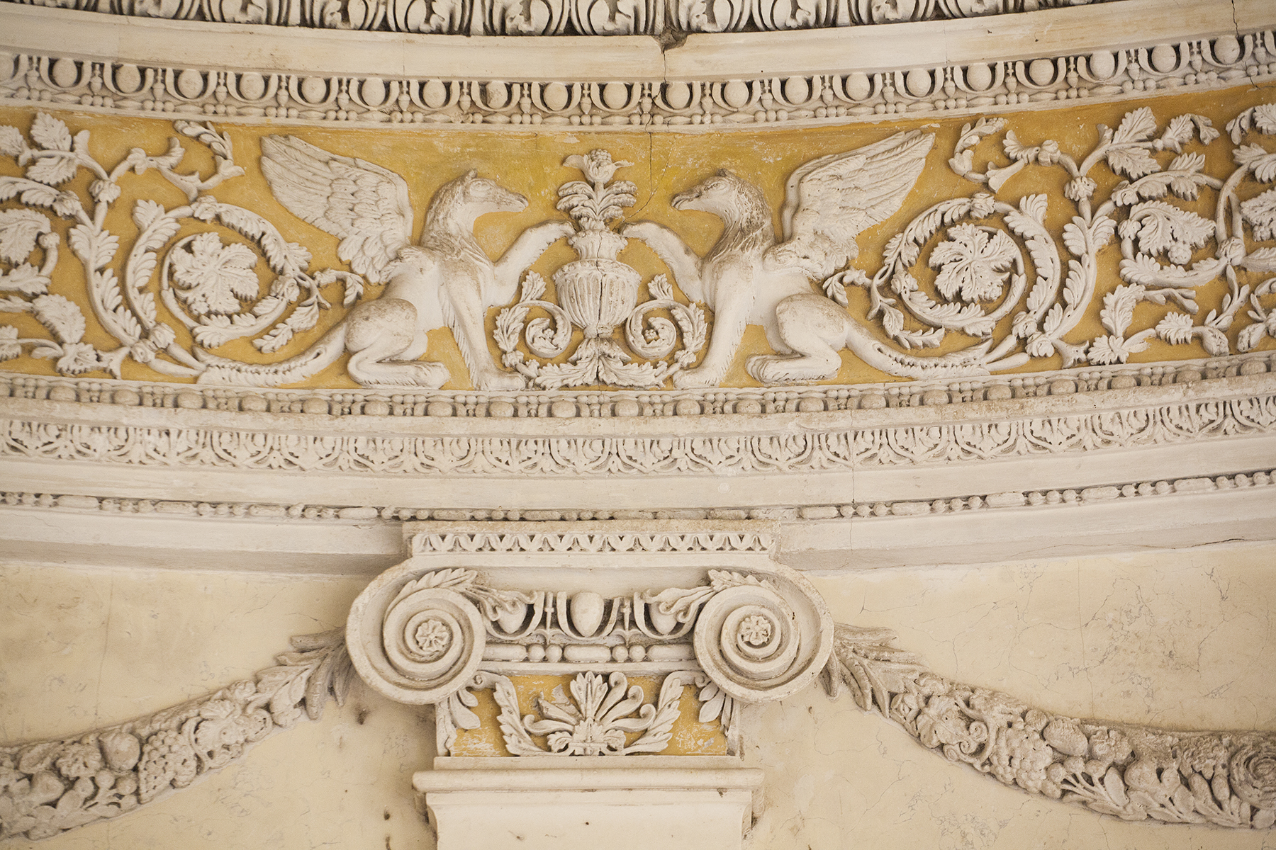 Палац, Серебринці